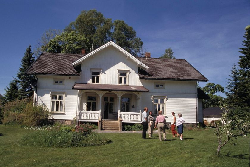 Hedrum prestegård. Foto: Synnøve Haugen, fra Riksantikvarens Kulturminnesøk.